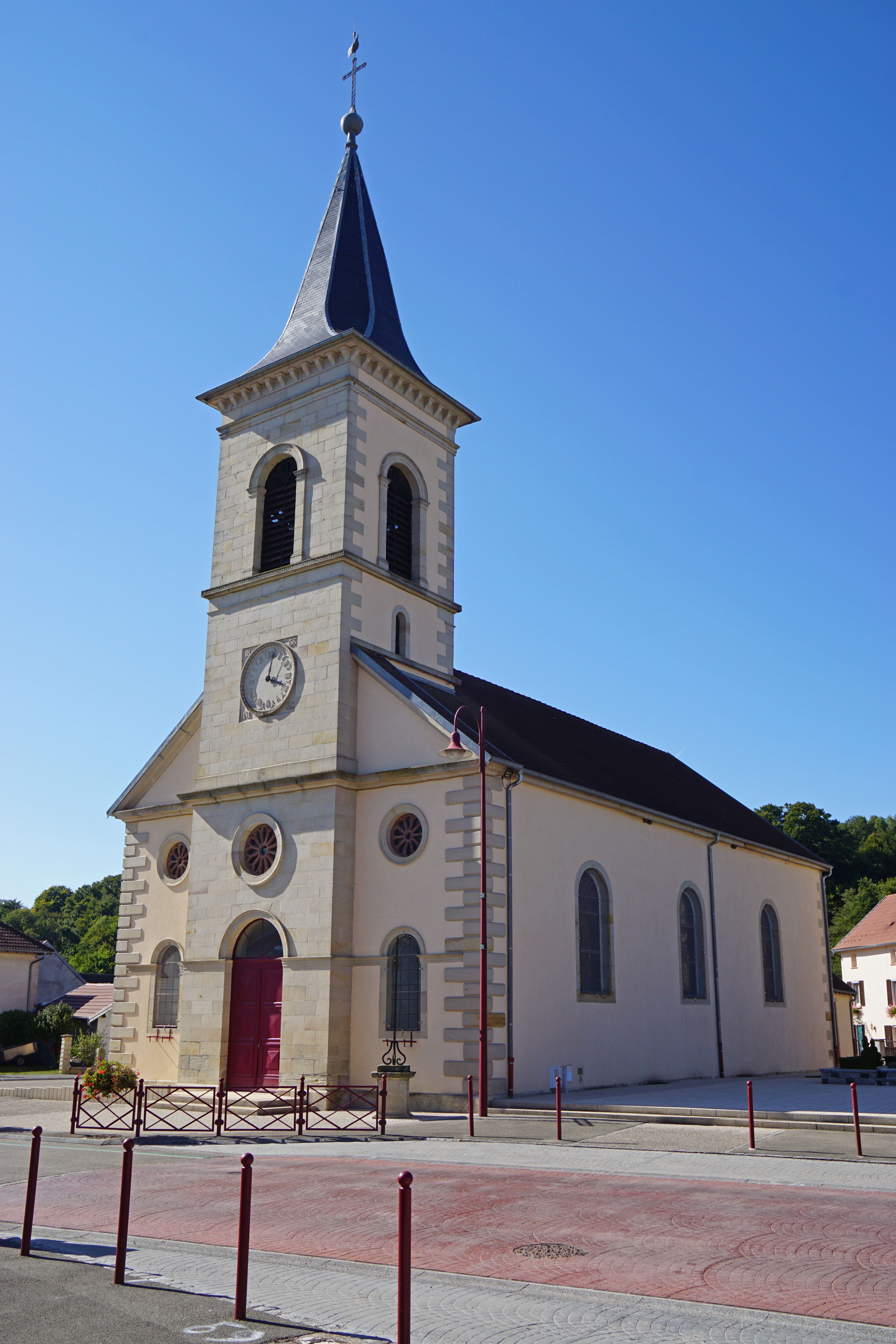 L'église Saint-Desle de Magny-Vernois 70.